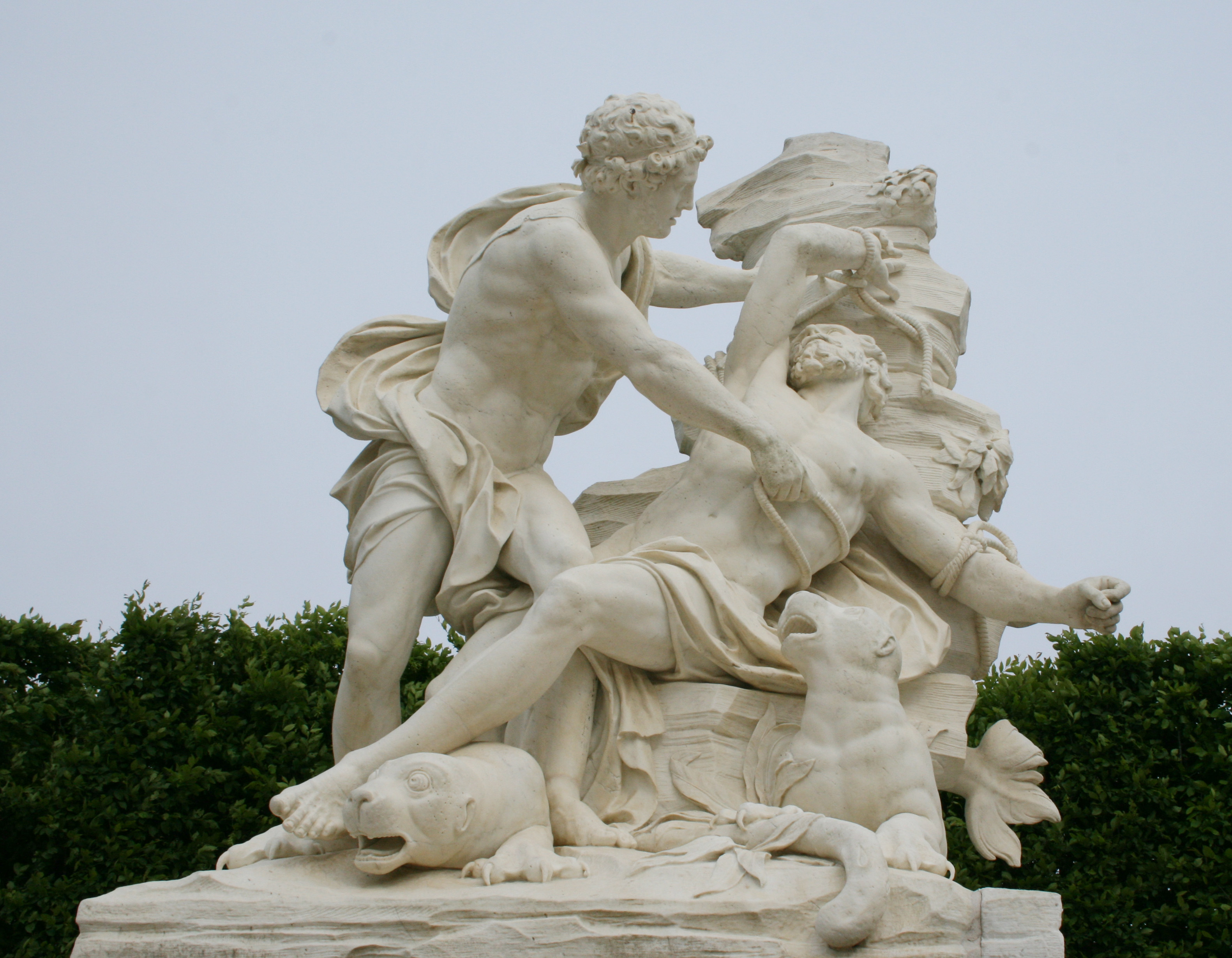 Aristée attachant le dieu marin Protée à un rocher pour le forcer à lui dévoiler son avenir.